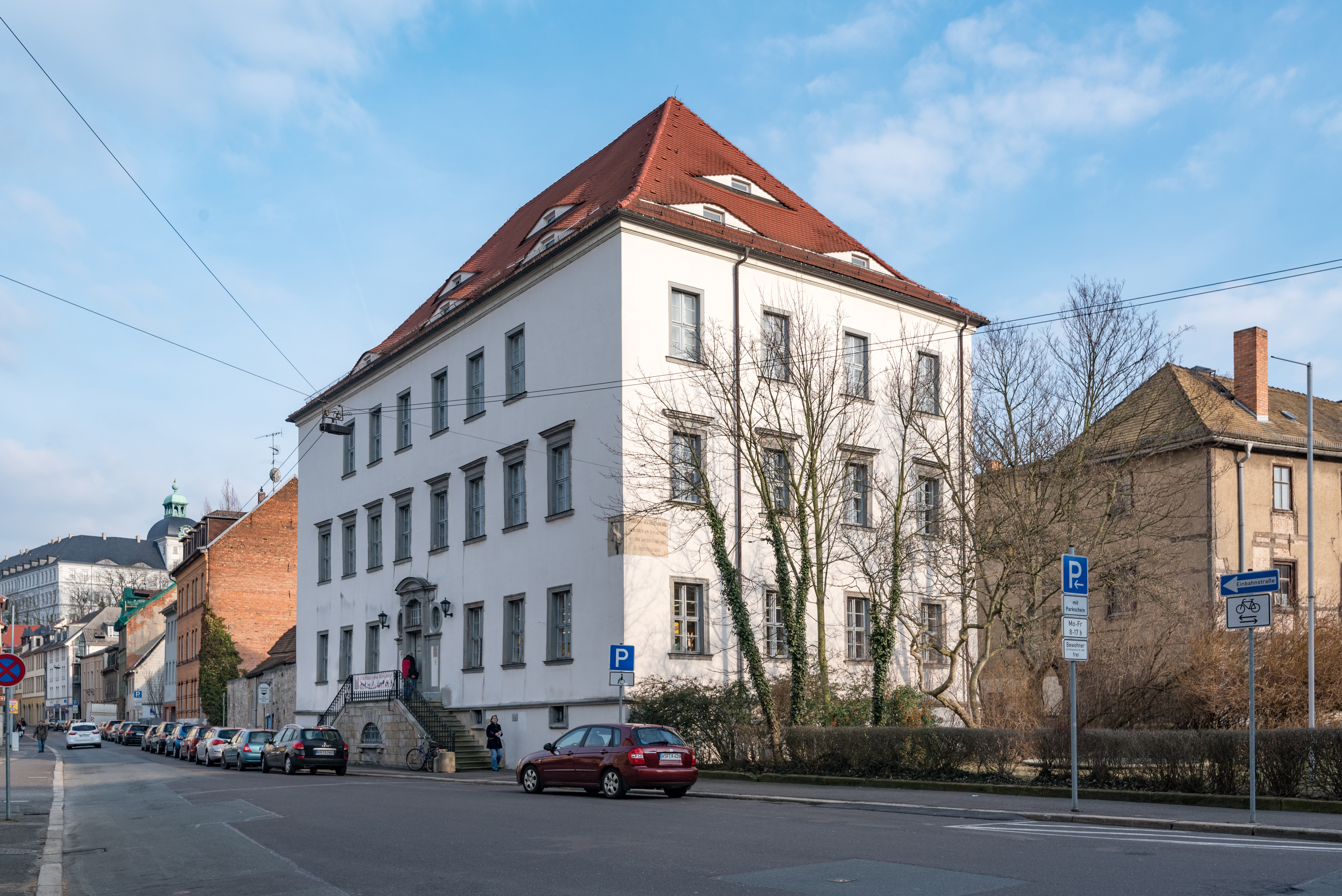 Weißenfels, Klosterstraße 24